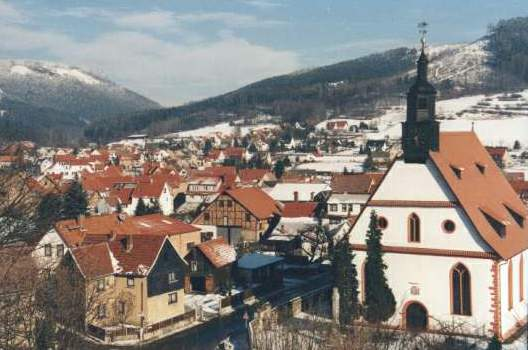 Ortsteil Seligenthal im Winter, Floh-Seligenthal, Thüringen, Deutschland